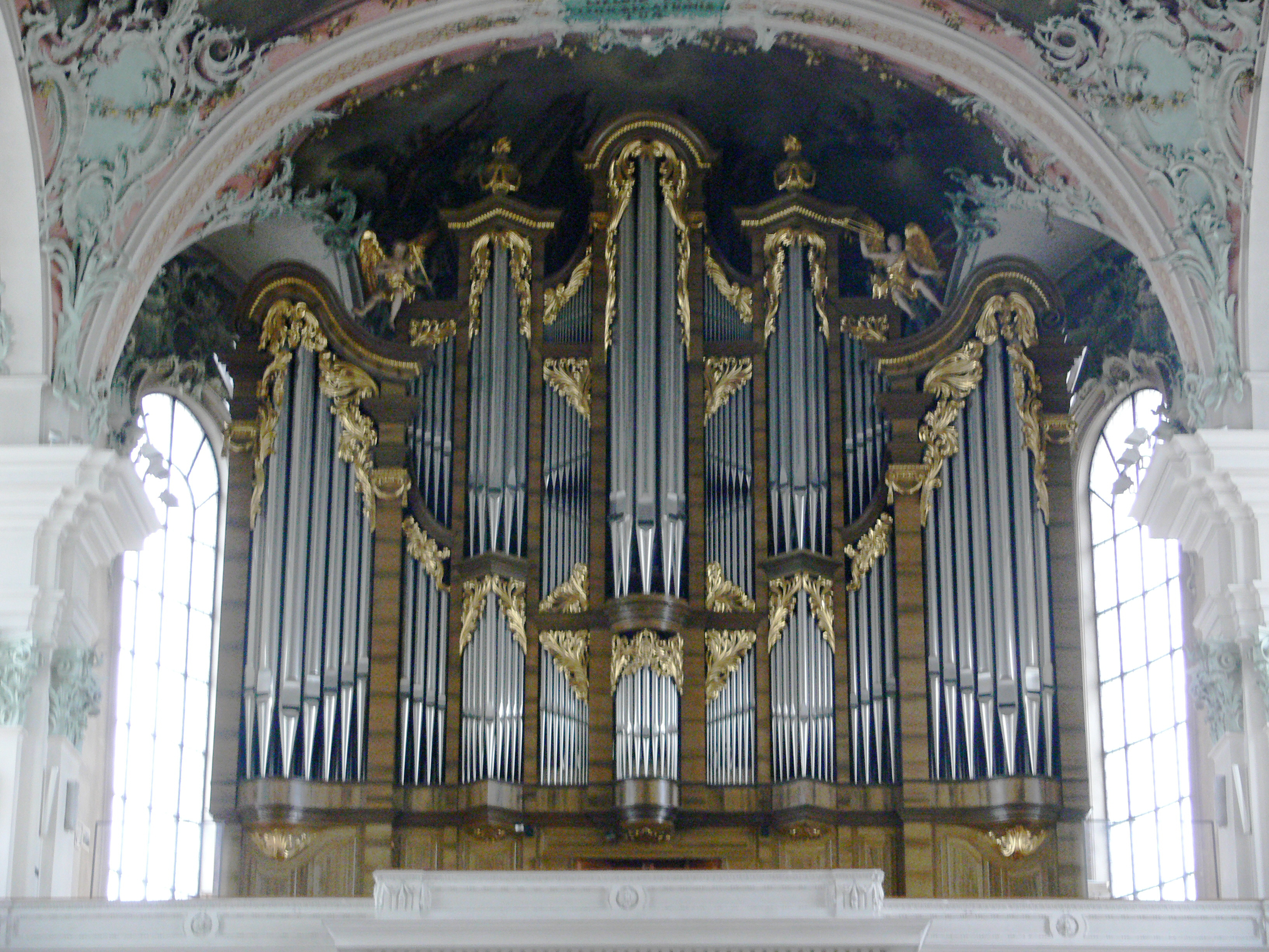 Orgel, Stiftskirche St. Gallen, Schweiz